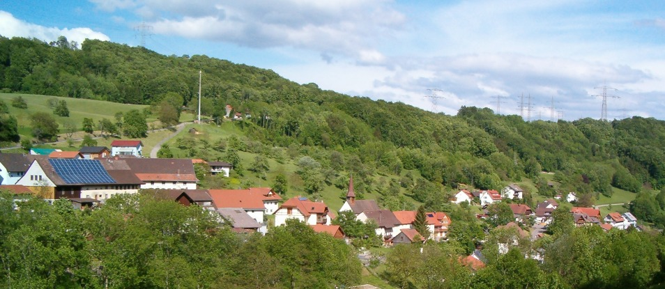 Schmitzingen, mittlerer und unterer Teil des Straßendorfes am Osthang (oder Westhang?) des Seltenbachtales. Aufnahme vom 23.05.2006.